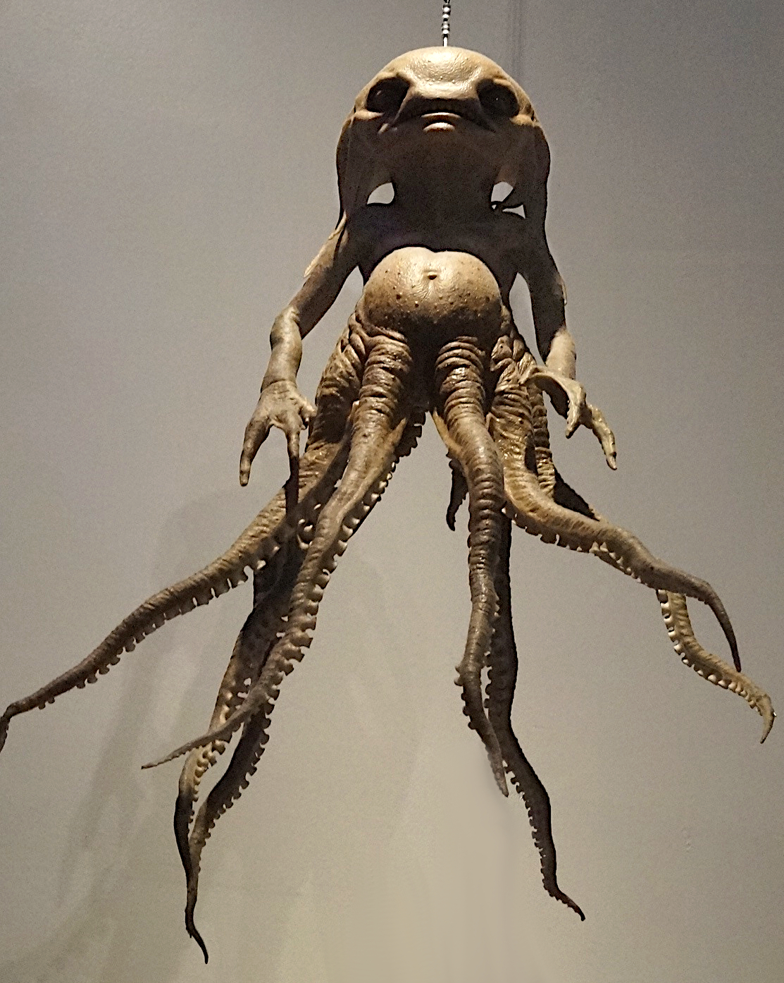 Creature